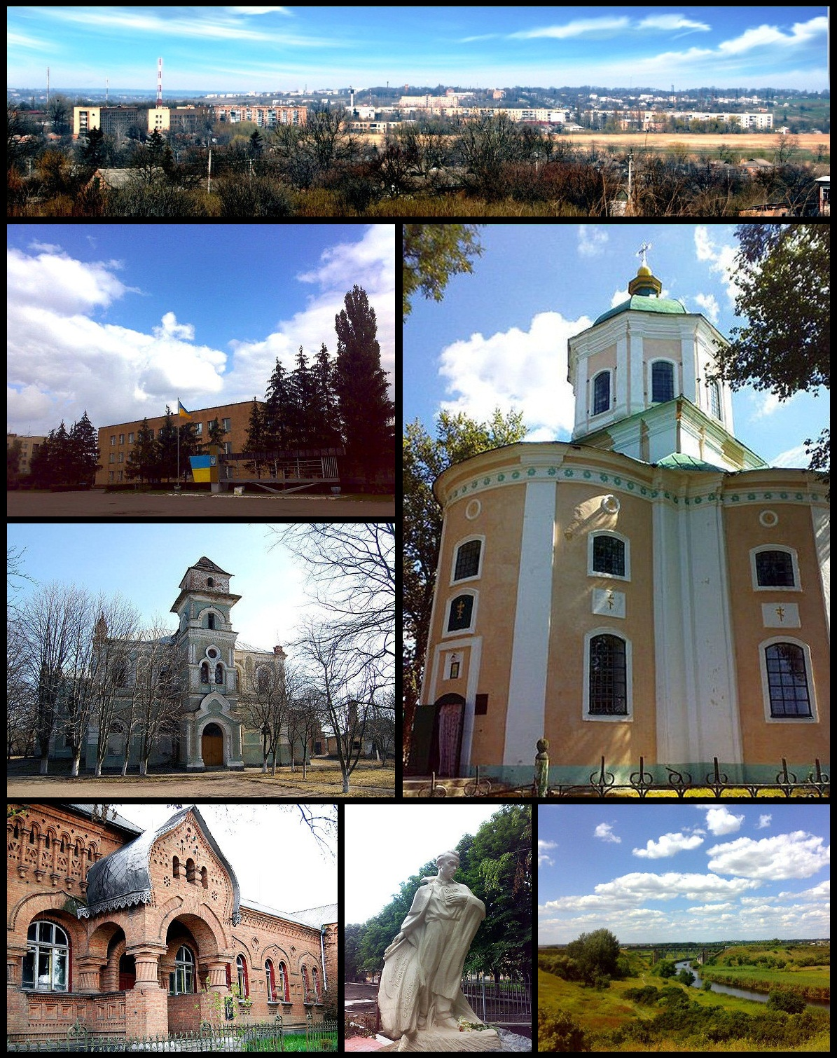 Згори за годинниковою стрілкою: Панорама міста, Іллінська церква, Панські гори, Пам'ятник Тарасові Шевченку, Лікарня Ганни Дмитрян, Златопільська гімназія, Центральна площа